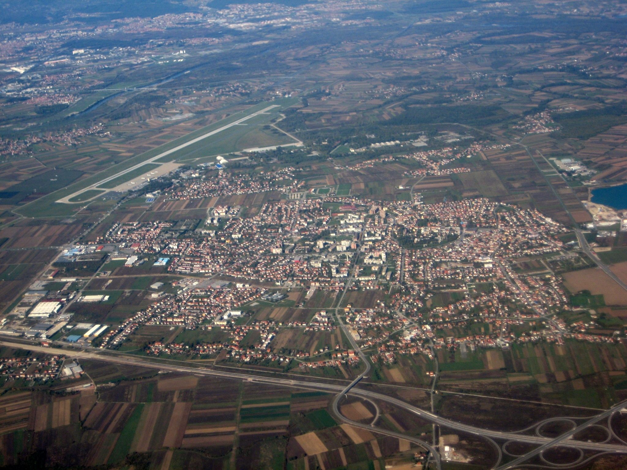 Velika Gorica iz zraka (Autocesta A11)